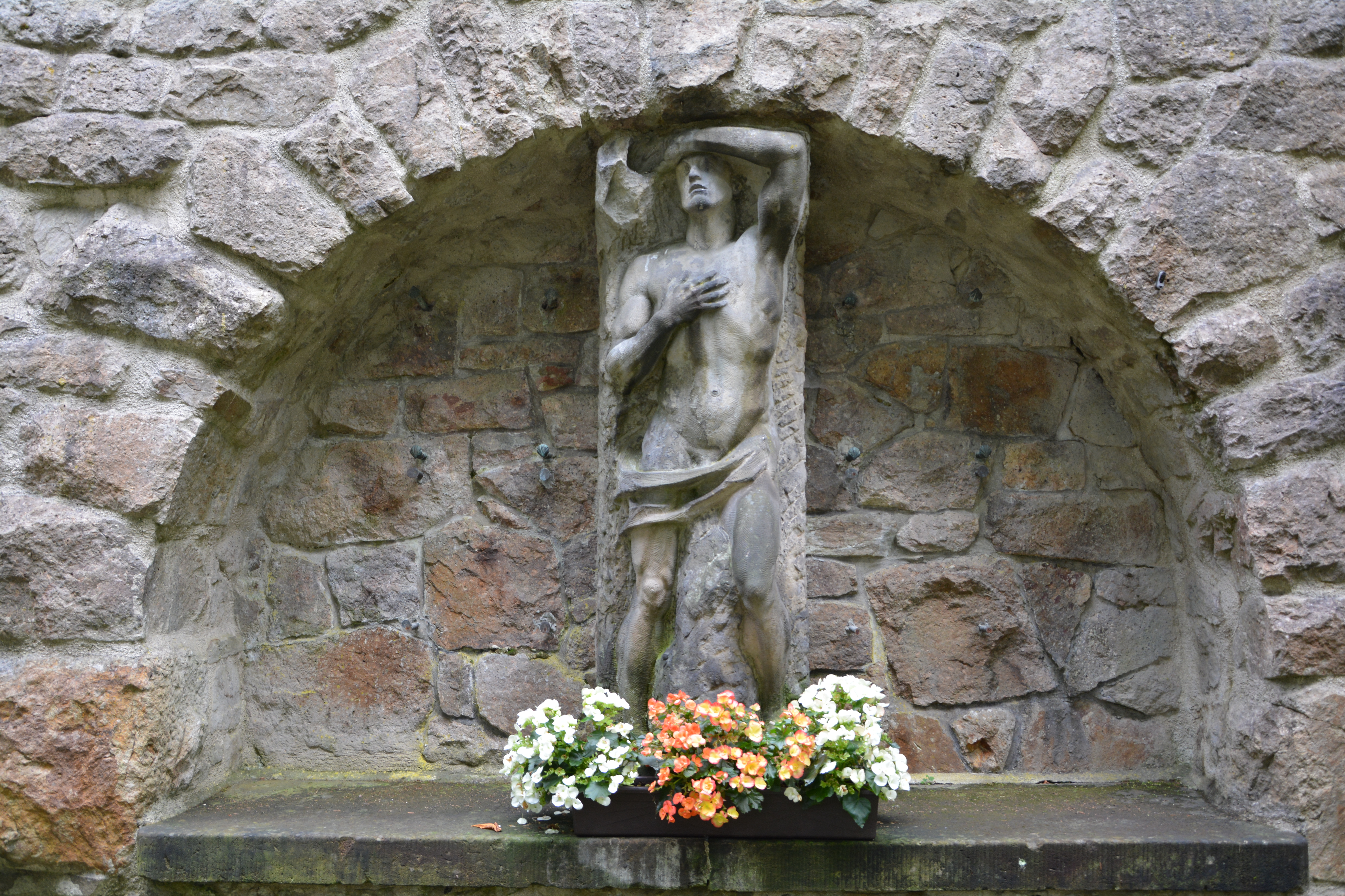 Bergkirche Kurort Kipsdorf, nach einen Entwurf von William Lossow und Max Hans Kühne 1908 erbaut. Kriegerehrendenkmal vom Dresdner Bildhauer Paul Polte. Am 24. Juni 1923 fand die feierliche Weihe des Denkmales statt.